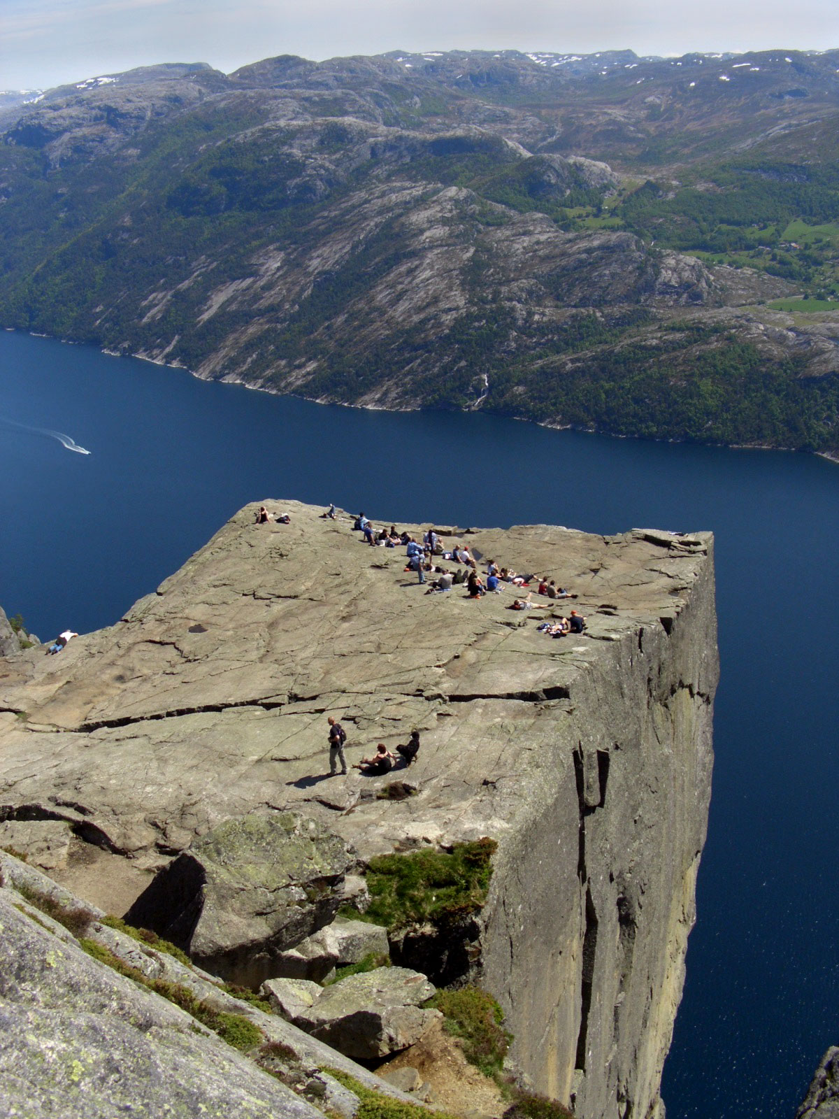 Preikestolen-Kanzel über dem Lysefjord